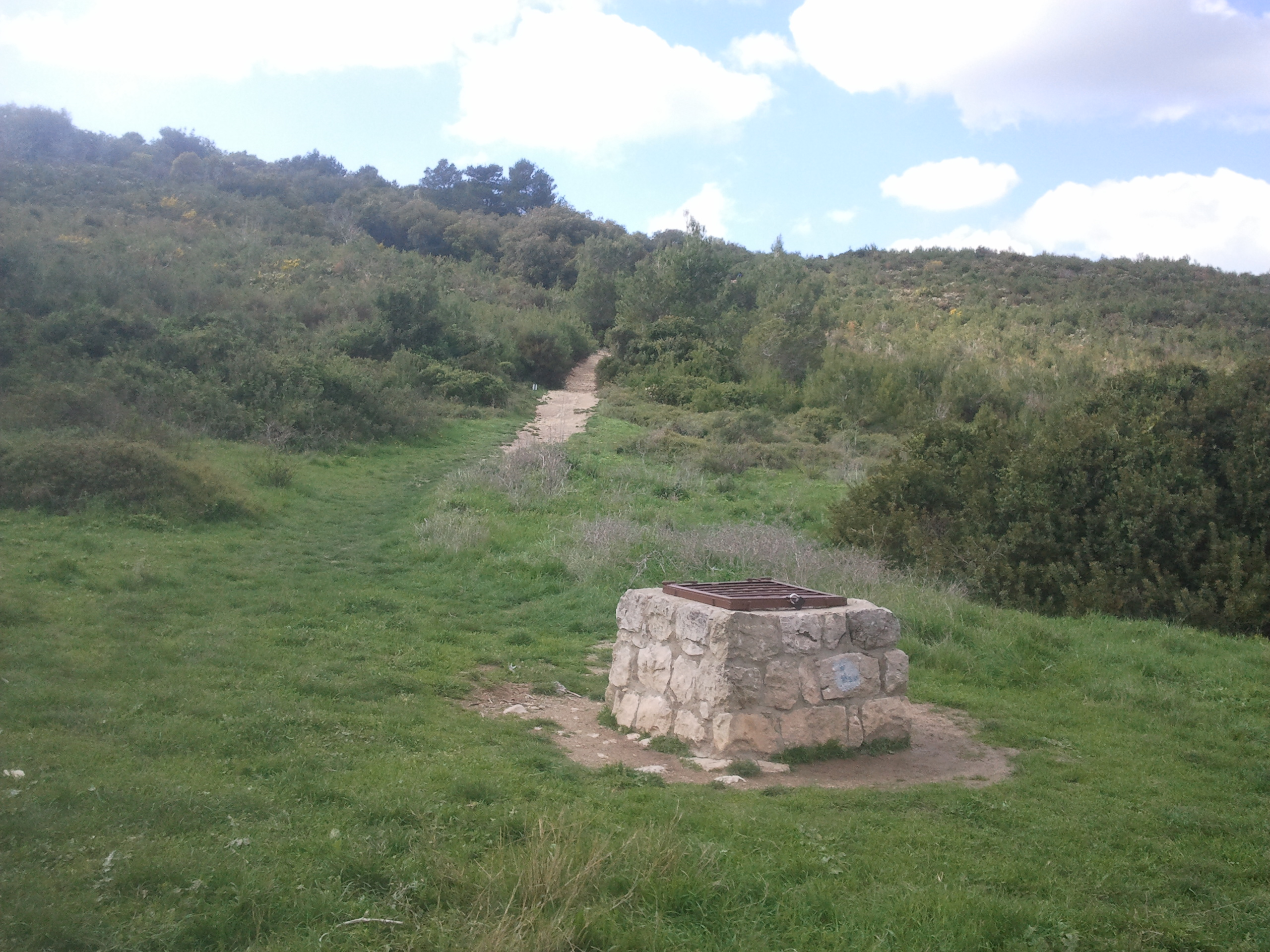 באר מים באחו ליד חורשת הארבעים על הר הכרמל. הבאר שימשה את מתיישבי "משמר הכרמל" שישבו באזור ממזרח לאוניברסיטת חיפה בין השנים 1943-1939